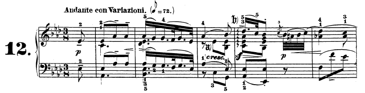 Compassos iniciais do primeiro movimento da Sonata Op. 26 de Beethoven - Tema